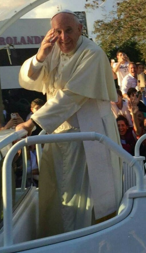 Saludo del Papa Francisco durante uno de sus recorridos en el papamóvil. Asunción, Paraguay.